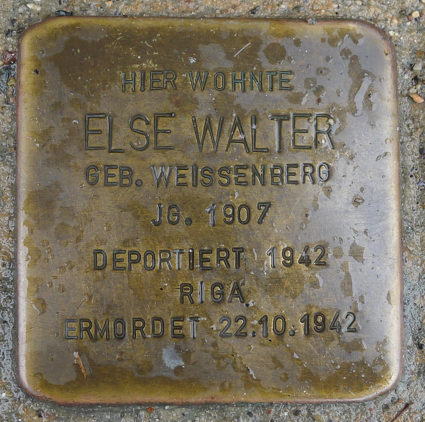 Stolperstein für Else Walter, Lange Straße 22, Greifswald